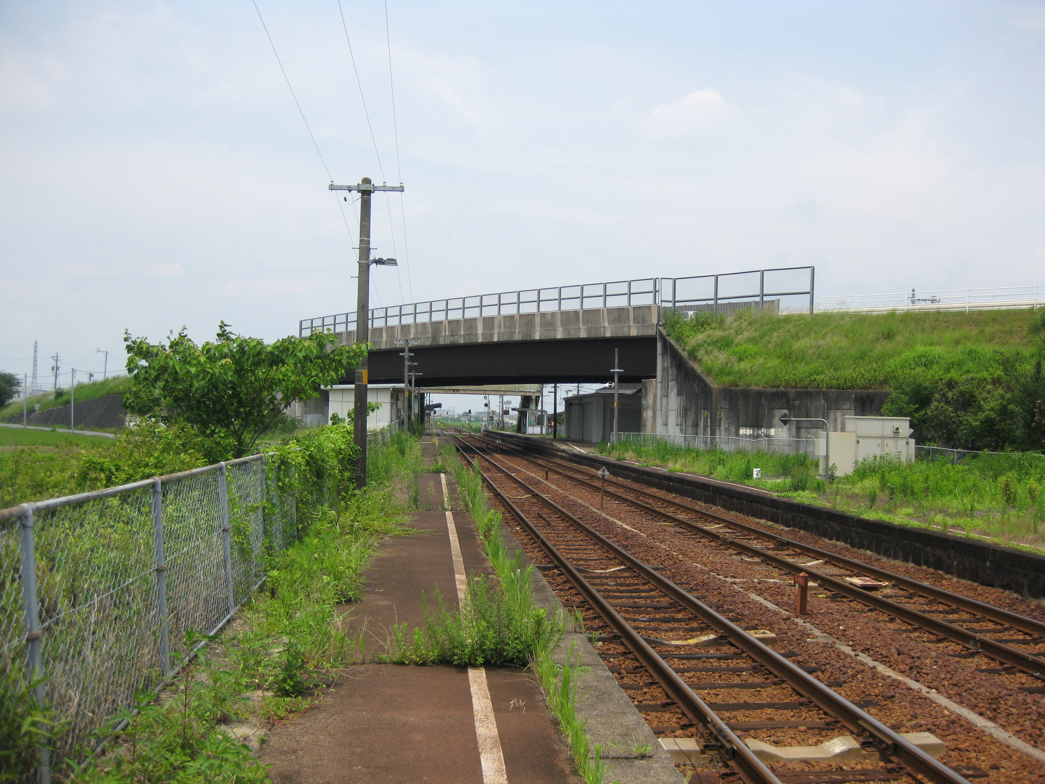 徳和駅を南側から。背後に見える陸橋は伊勢電気鉄道の遺構。